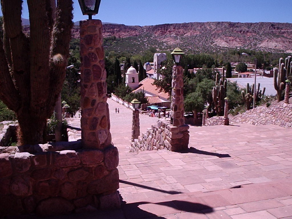 Humahuaca, Jujuy, Argentina